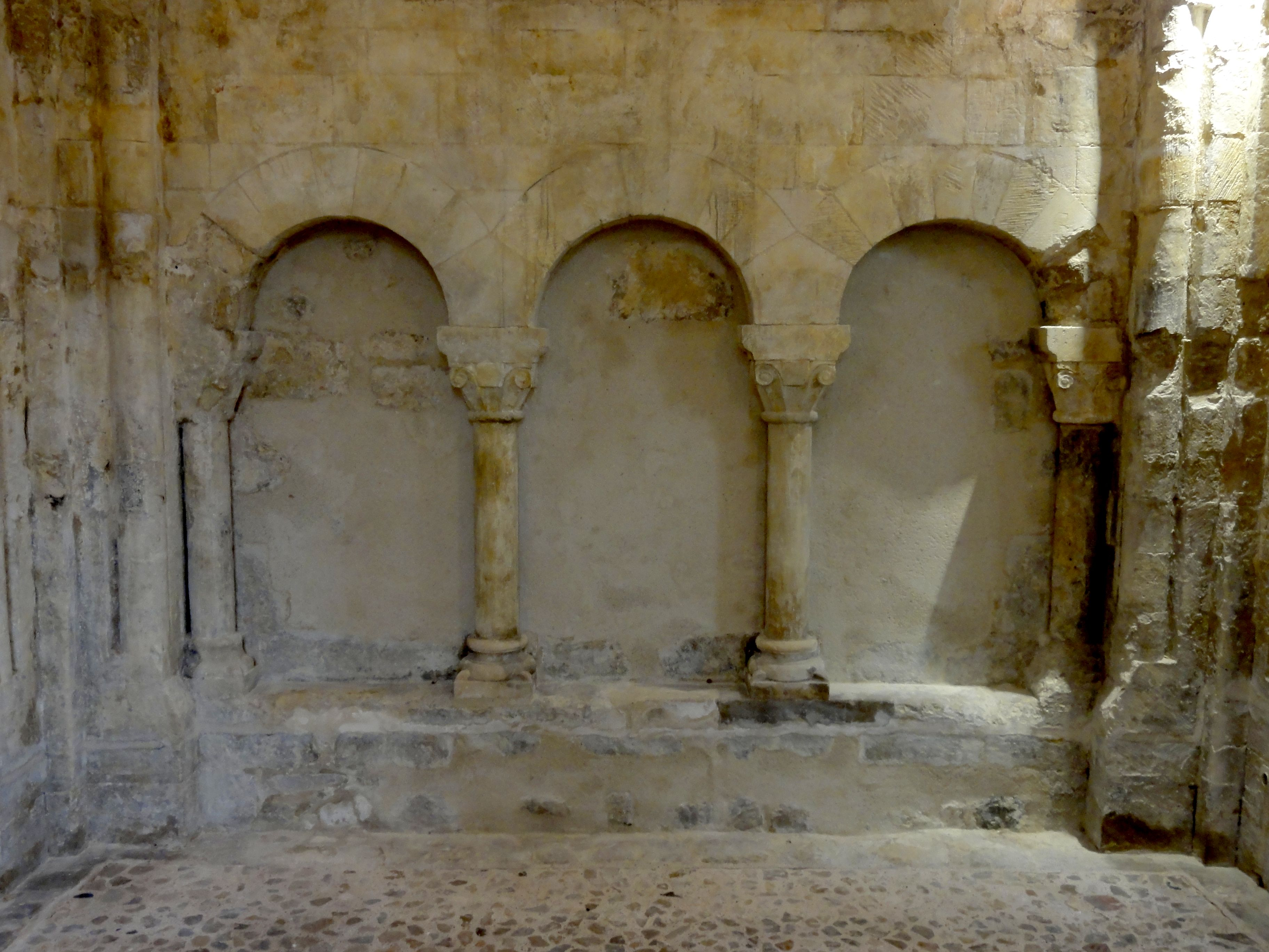 Choeur, arcatures aveugles du chevet.